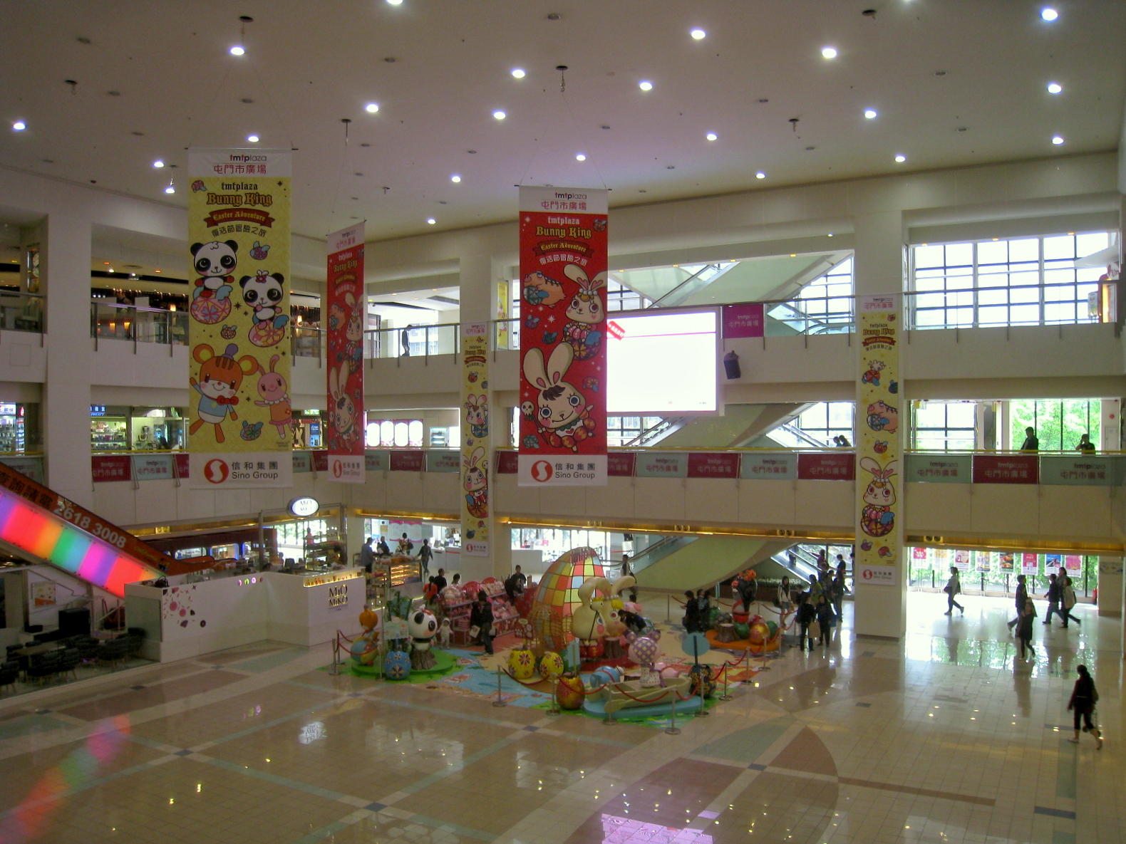 Tuen Mun Town Plaza Main Void in 2009